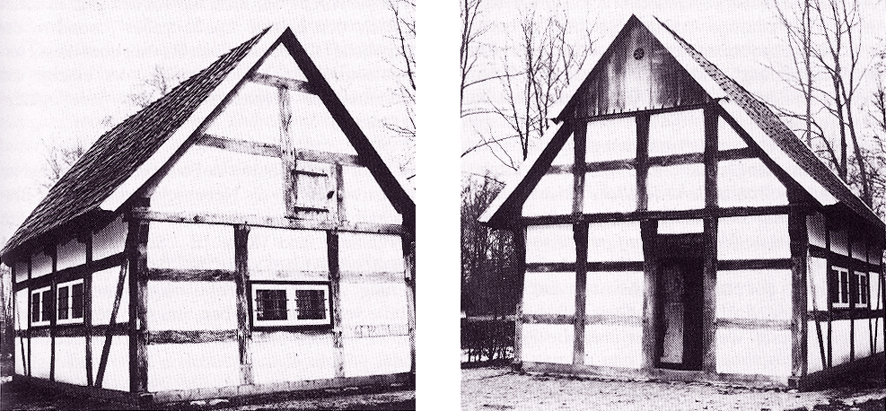 Das alte Schulhaus der 1751 erbauten Nebenschule Renslage(heute Ortsteil von Menslage). Mittlerweile transloziert zum Museumsdorf Cloppenburg. Die Fotografie wurde am Originalstandort in den 1930er Jahren gemacht; der Fotograf ist namentlich unbekannt.